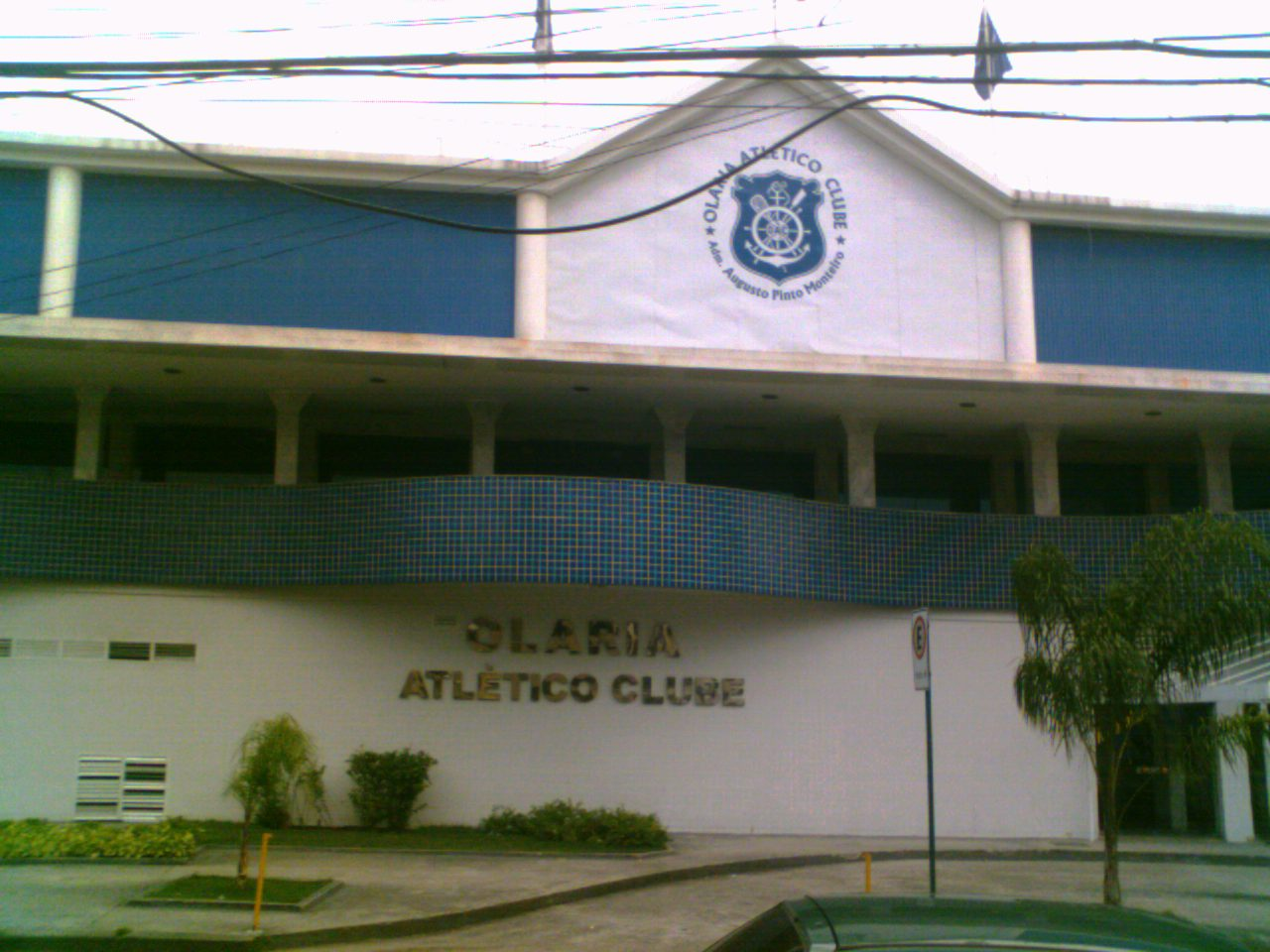 Sede do clube de futebol Olaria.